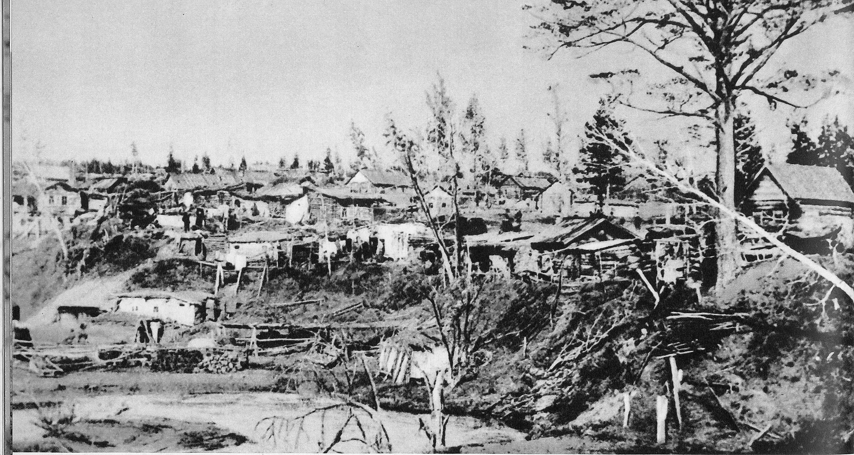 Novosibirsk 1895